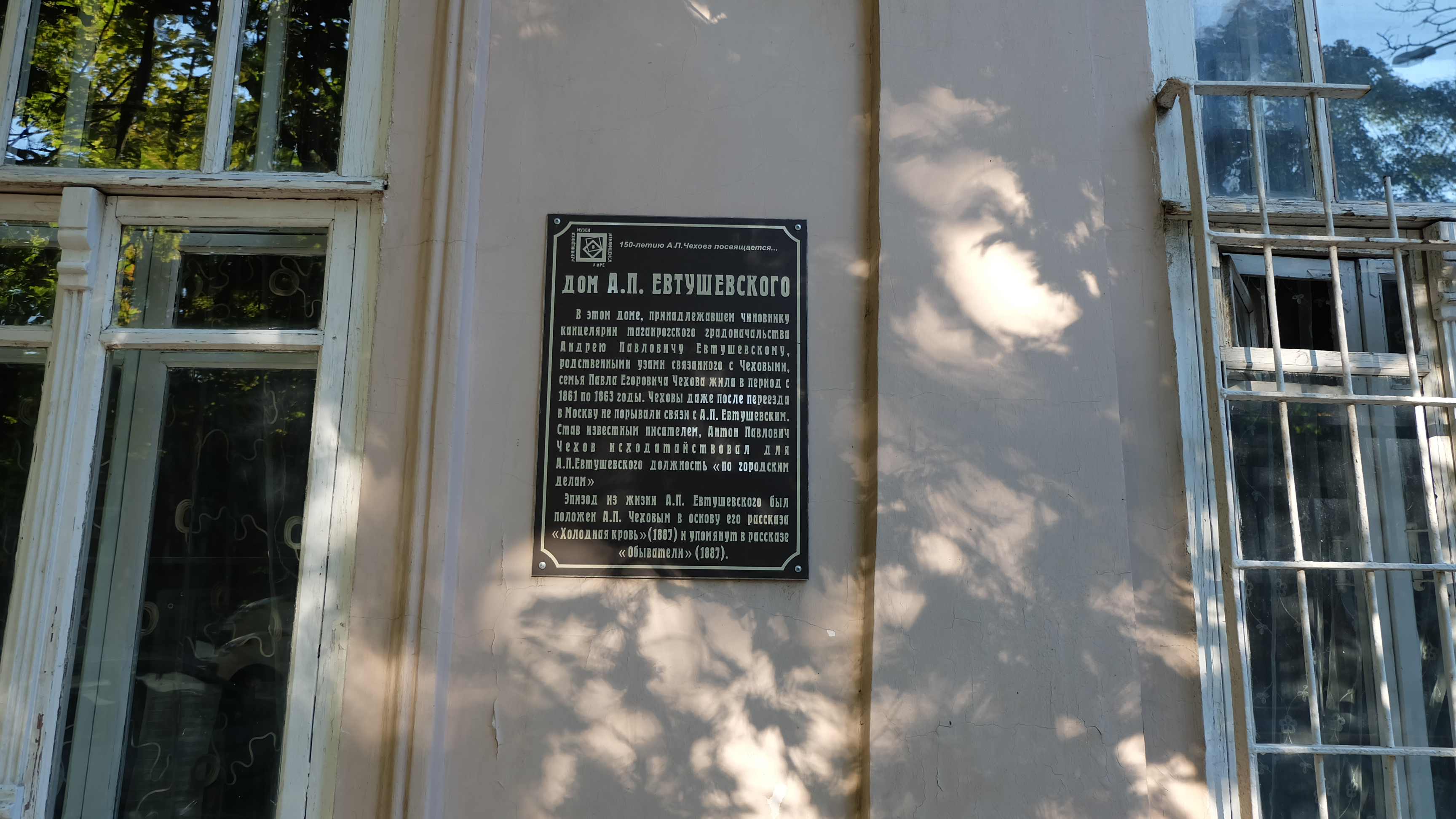 Жилой дом: переулок А. Глушко, 40, Таганрог, Ростовская область